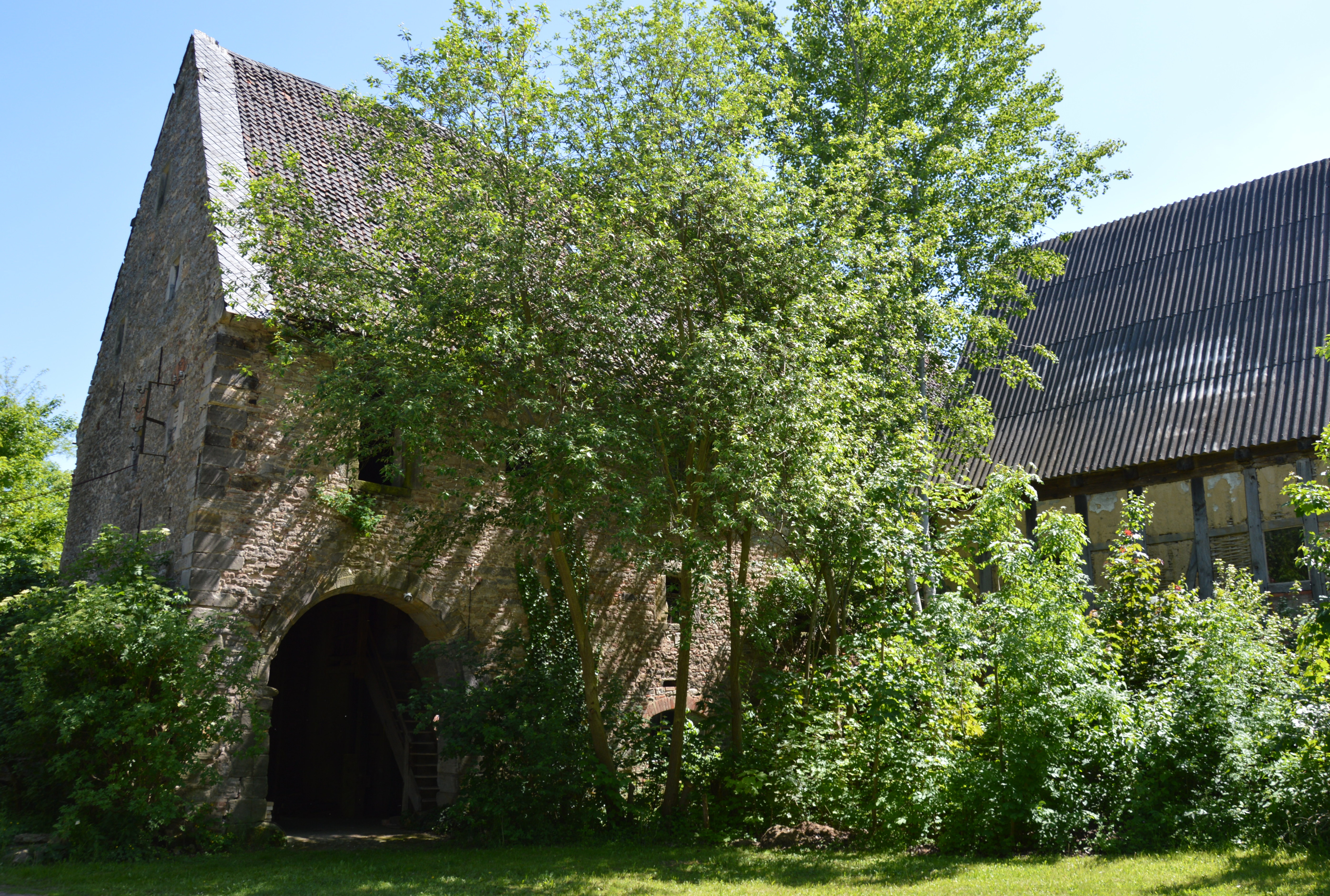 Auf dem Amt in Hötensleben